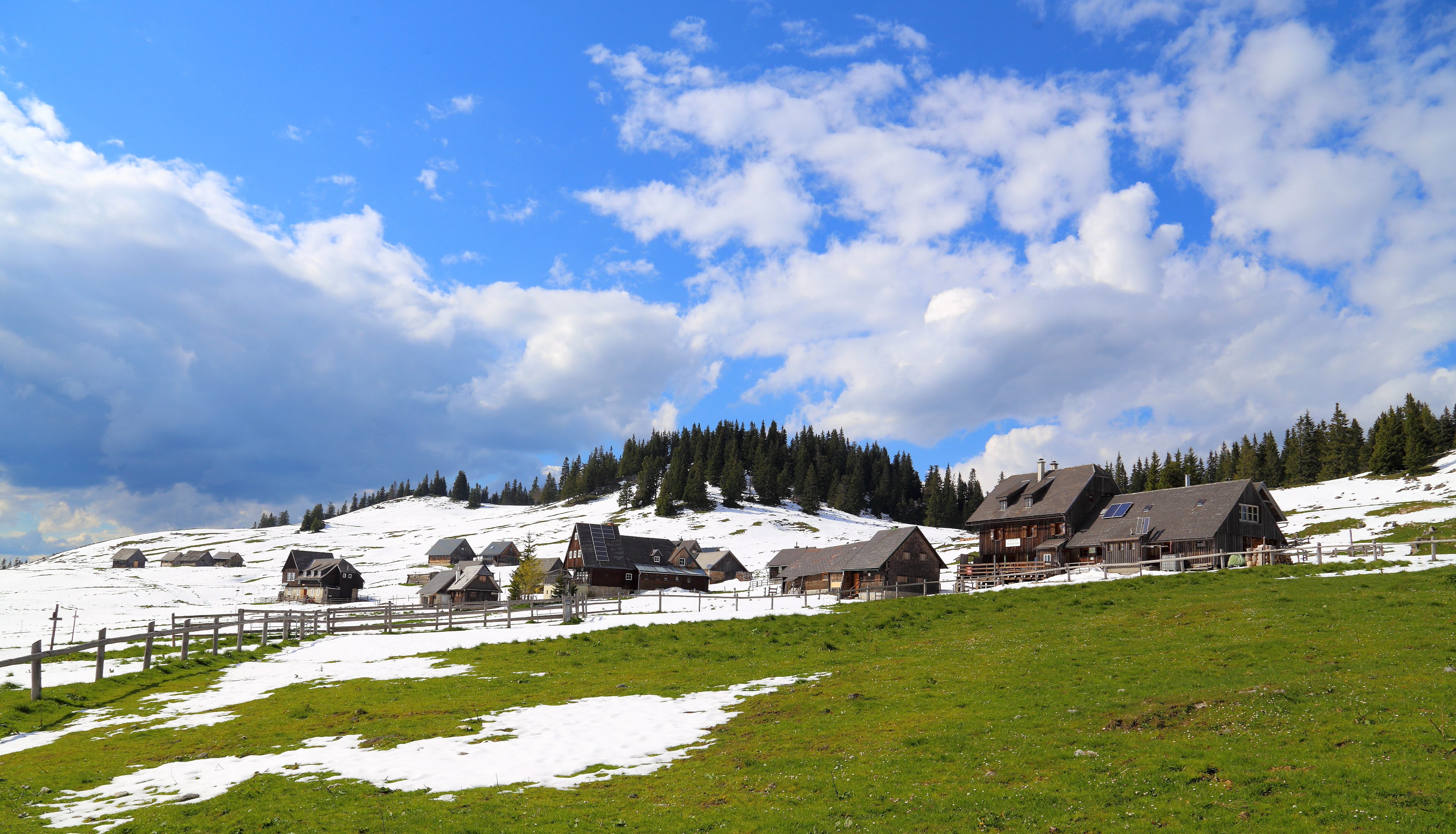 Die Hinteralm am westlichen Schneealpeplateau, das ein Teil des Naturparkes Mürzer Oberland ist. In der Bildmitte die Selbstversorgerhütte "Hinteralmhaus" (frühere Bezeichnung: Wiener-Lehrer-Hütte) des Alpenvereins und rechts die Neubergerhütte von den Naturfreunden. This file shows the Nature Park with the ID 6410 in Austria.